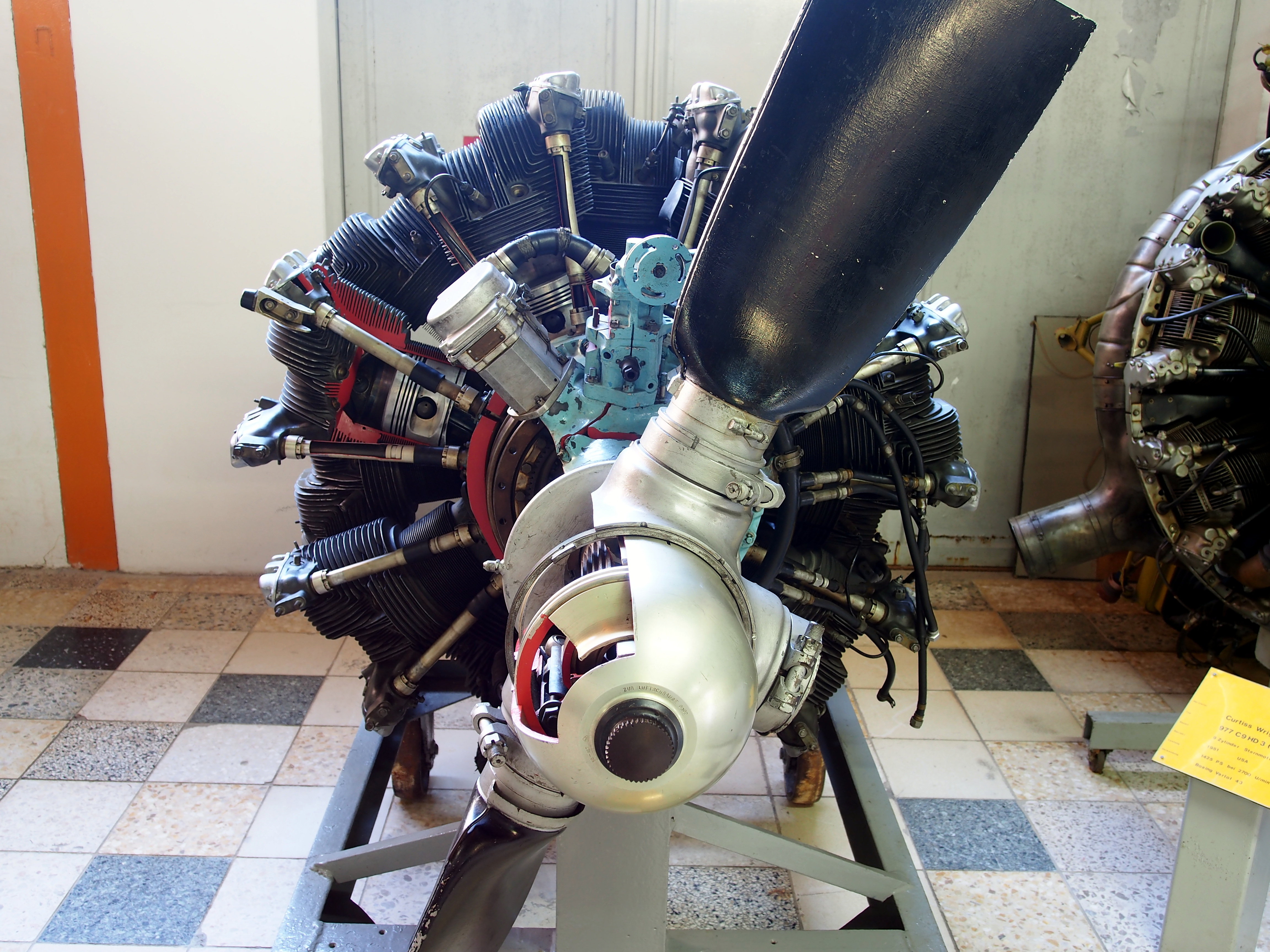 Photographed at Hermeskeil.